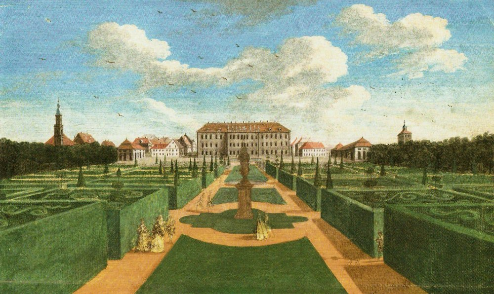 Markgräfliches Schloss und Schlossgarten in Erlangen. Blick von Osten.